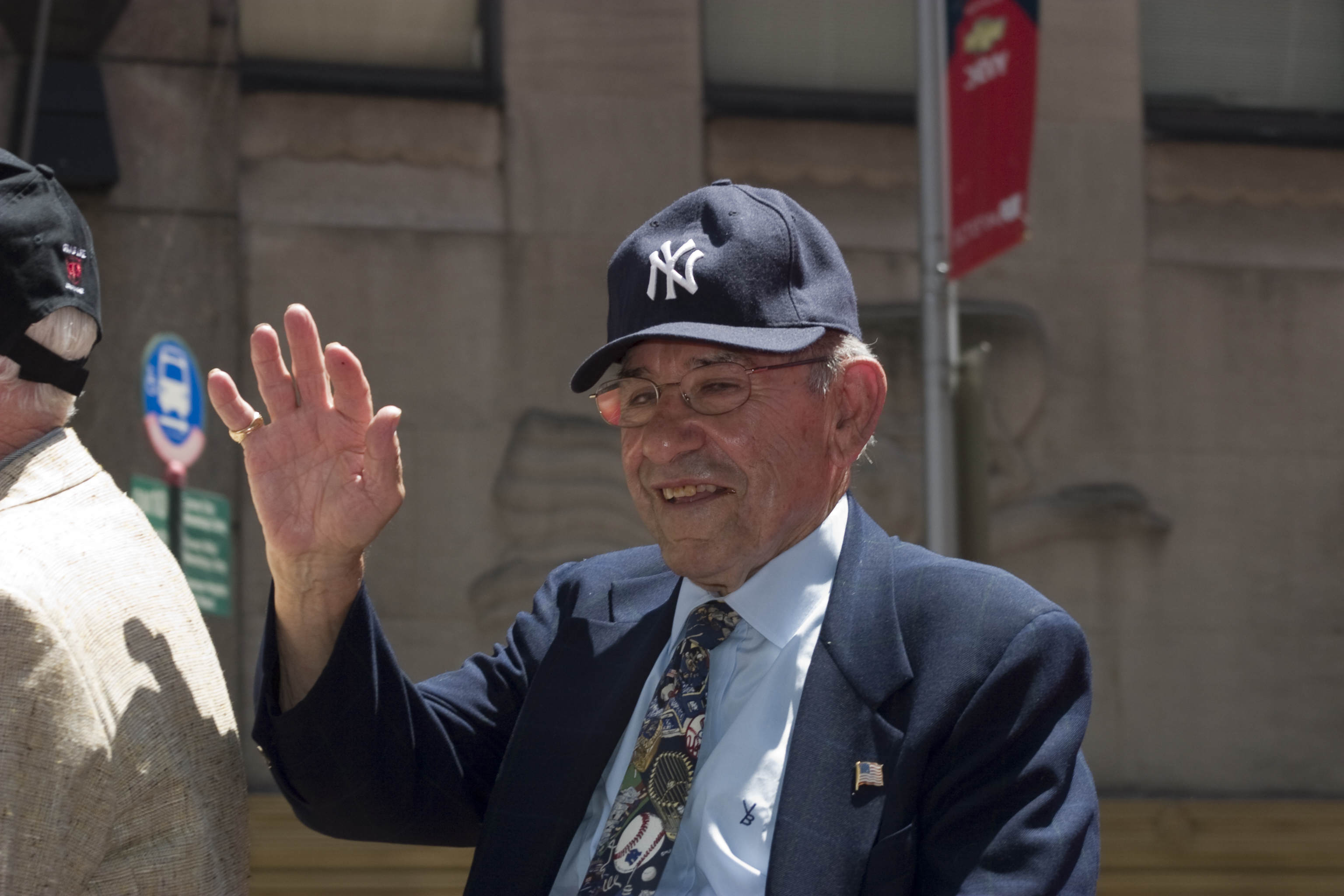 Yogi Berra during All-Star Game Red Carpet Parade 2009